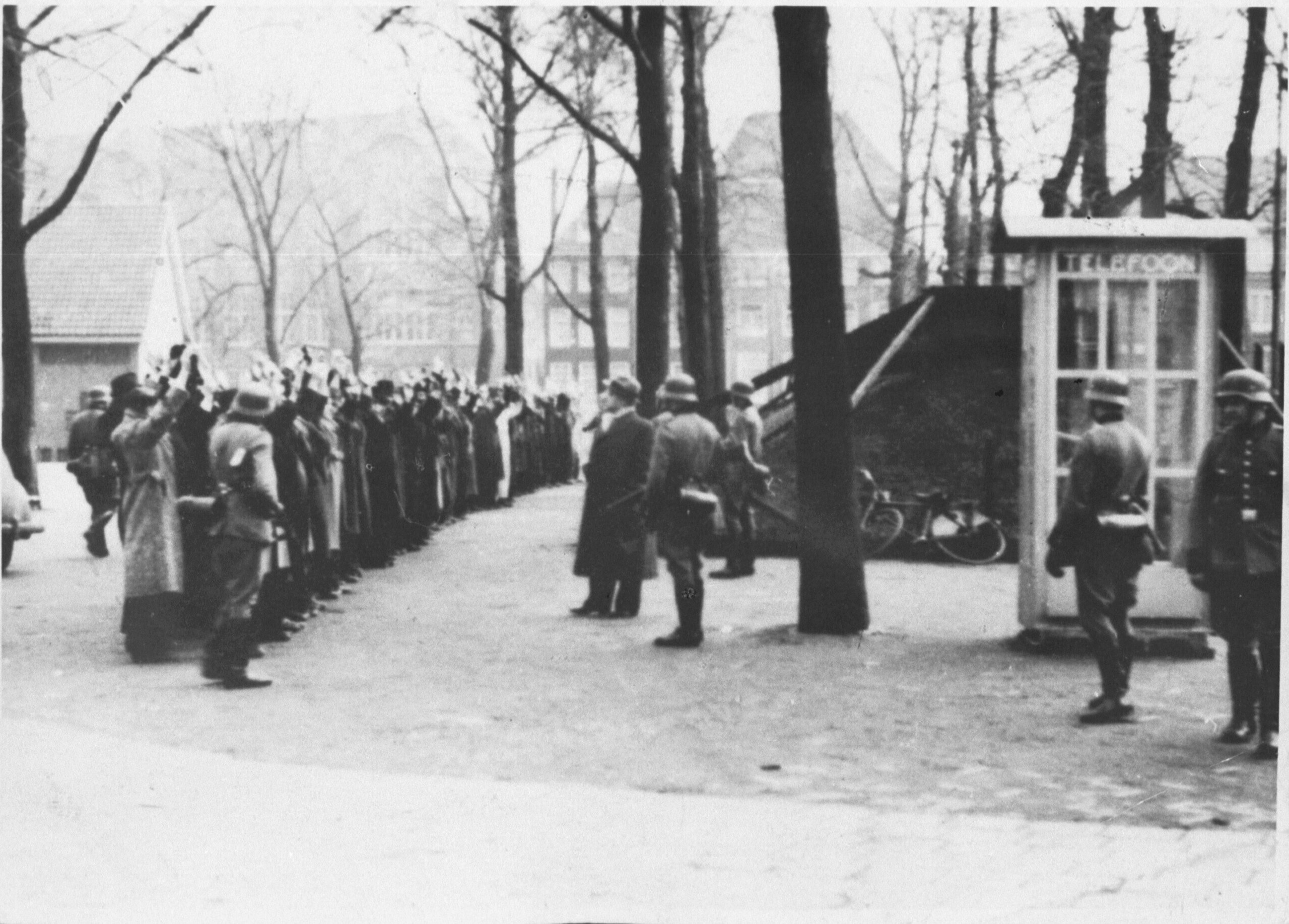 Razzia op Joden, Jonas Daniël Meijerplein. Himmler, Seyss-Inquart en Rauter besloten een voorbeeld te stellen: de eerste razzia op joden werd een feit. Op zaterdagmiddag 22 februari 1941 verscheen een colonne Duitse vrachtwagens in de buurt van het Waterlooplein. De omgeving werd geheel afgezet. Op meedogenloze wijze werden jonge joodse mannen op het Jonas Daniël Meijerplein bijeen gedreven. Ook op de dag daarop werden vele joodse mannen opgepakt. In totaal 427 joden tussen de twintig en vijfendertig jaar werden afgevoerd naar het kamp Schoorl.